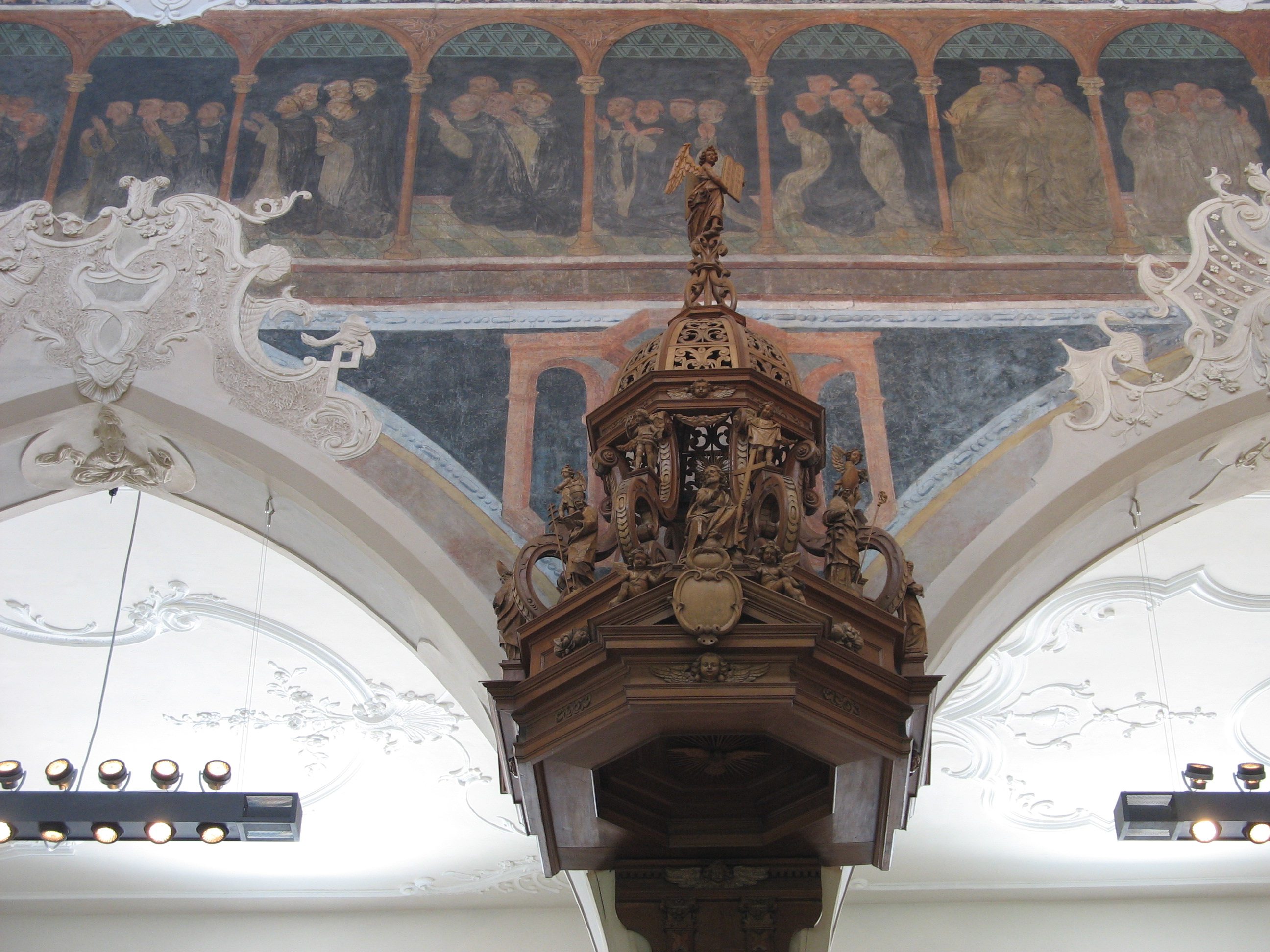 Konstanz, Dreifaltigkeitskirche, Kanzel